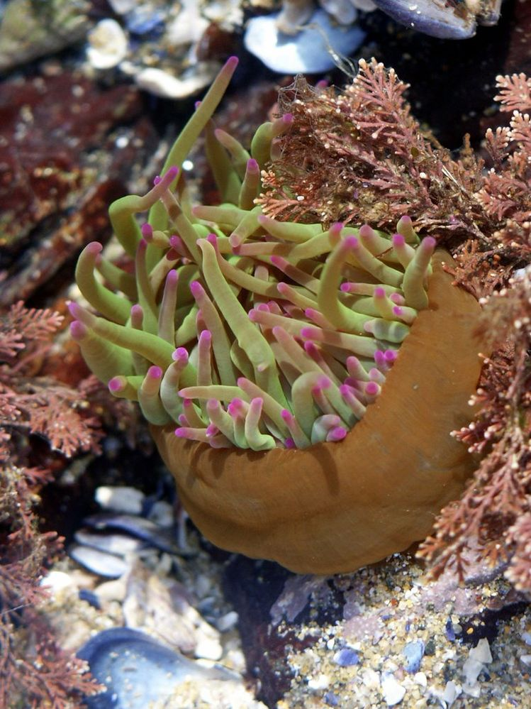 Anémone de mer